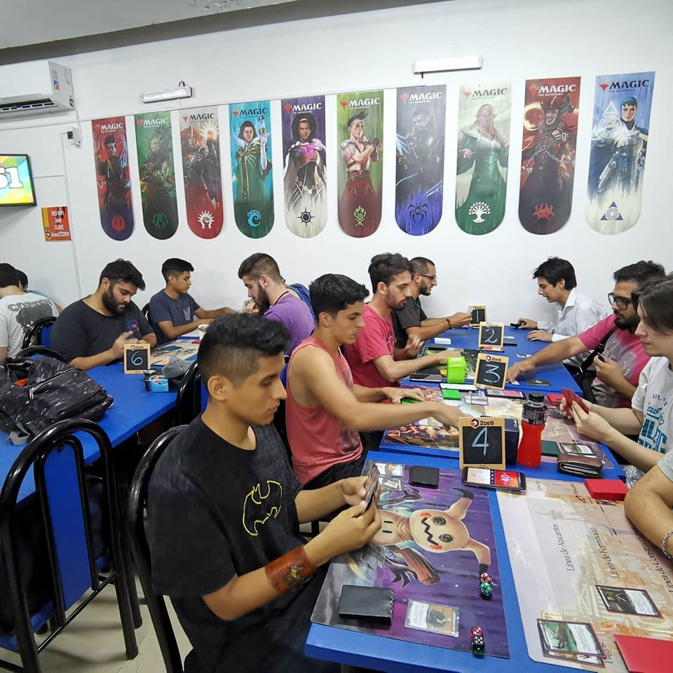 Jugadores en el primer torneo de lanzamiento disputado en la Ciudad Autónoma de Buenos Aires.